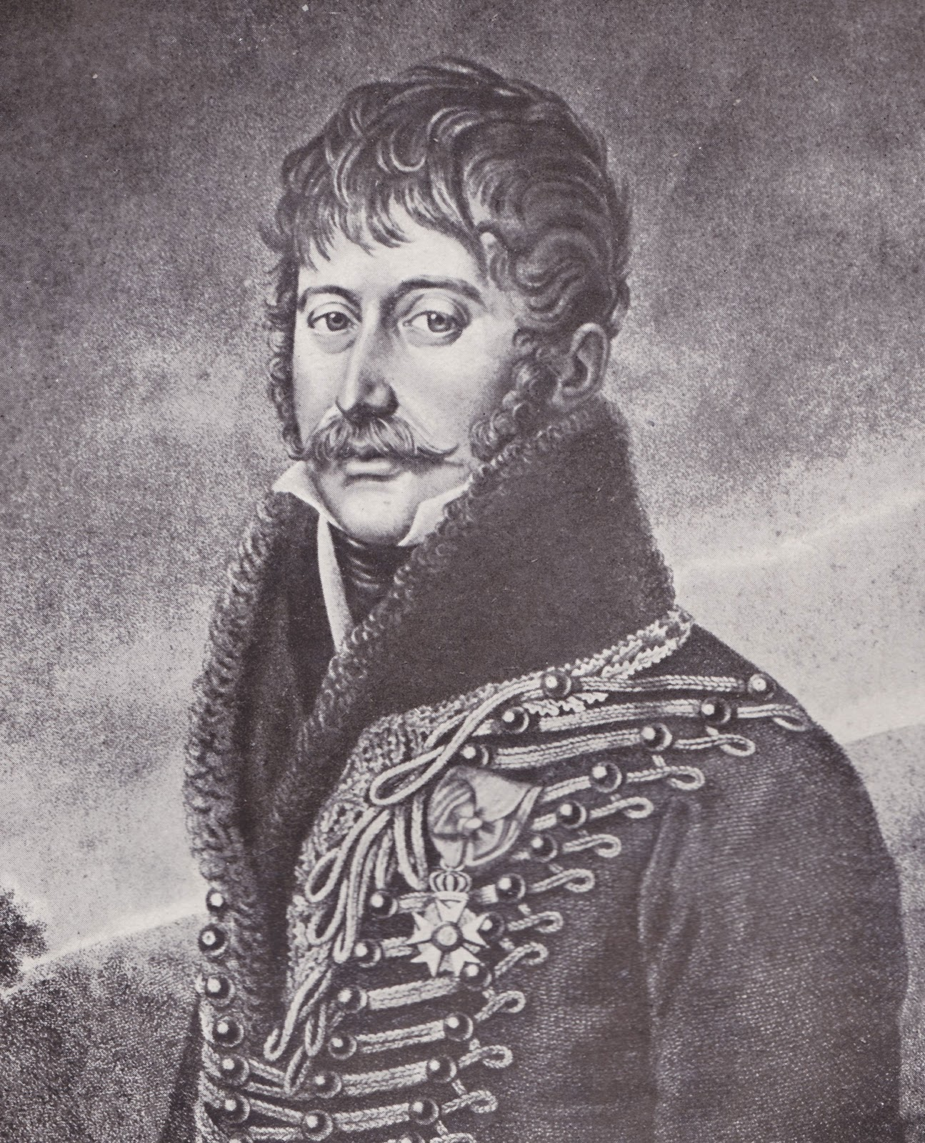 Adelaïde Blaise François Le Lièvre de La Grange, général de cavalerie français de la Révolution et de l'Empire (1766-1833).